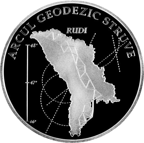 Реверс памятной монеты "Геодезическая дуга Струве"